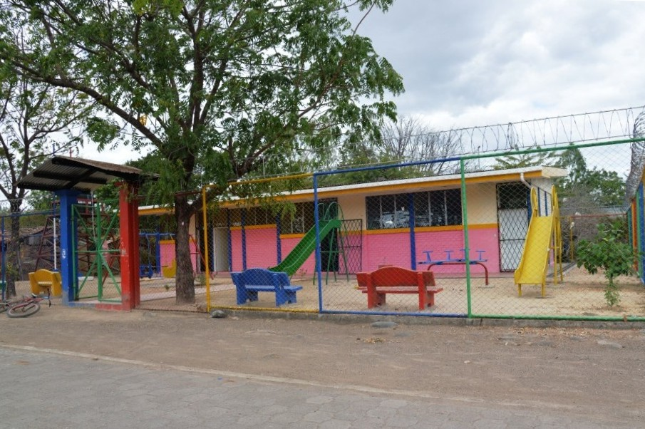 La escuela en El Mojarra, El Jicaral, Nicaragua.